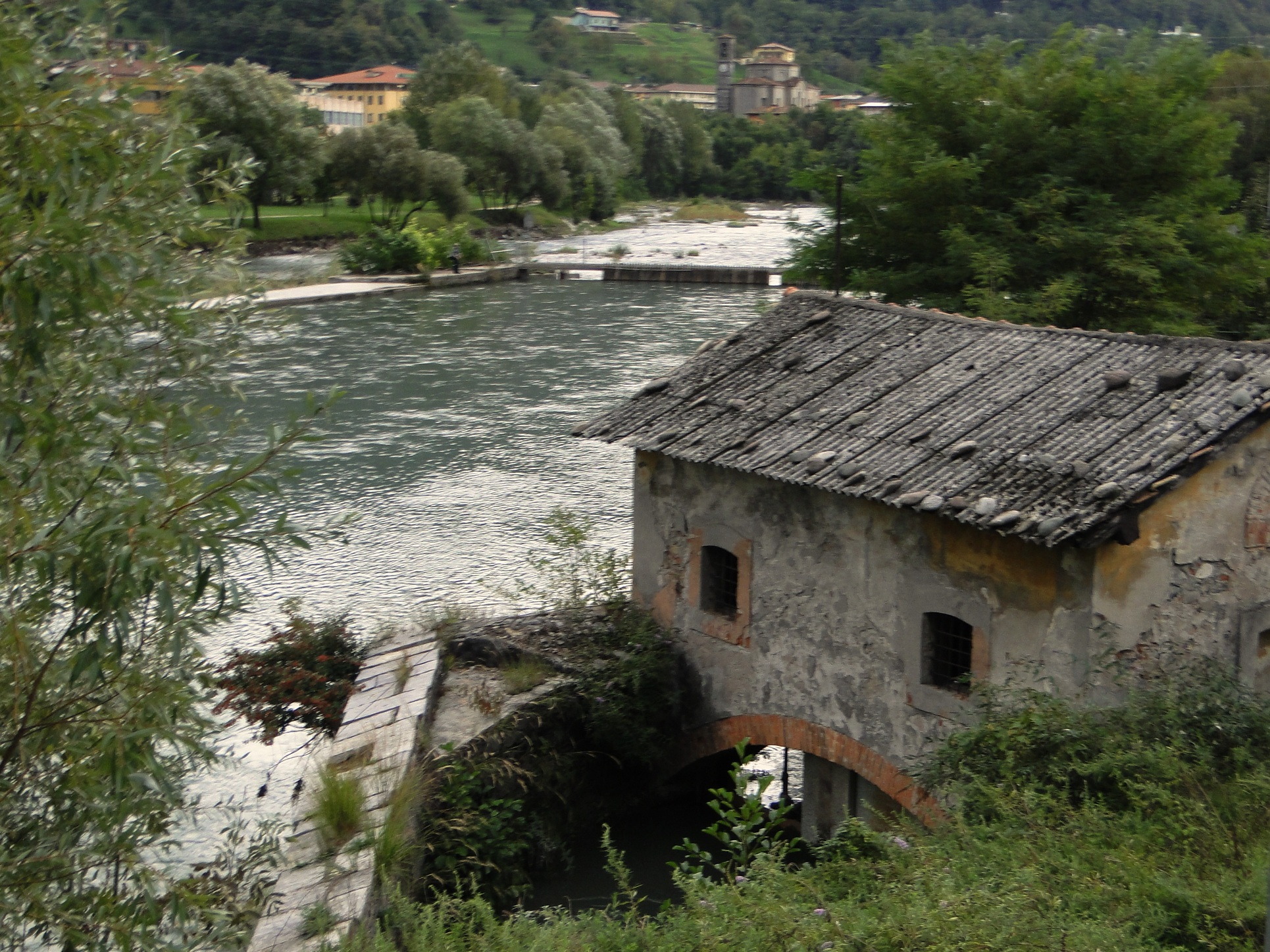 Serio presso Albino, loc. Ponte Cene, bocche presa roggia Comenduna